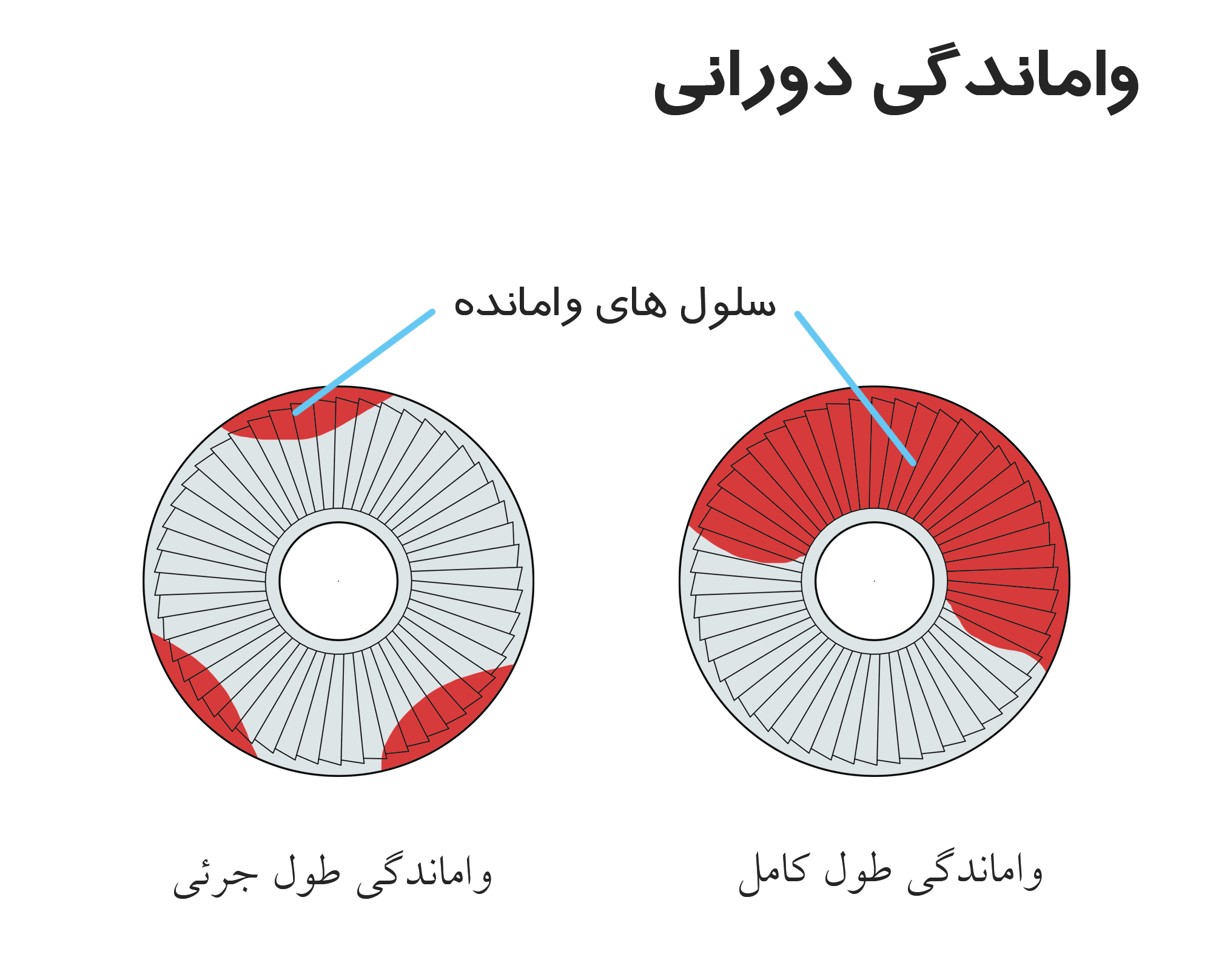 تصاویری که واماندگی چرخشی را در یک کمپرسور جریان محوری نشان می دهد